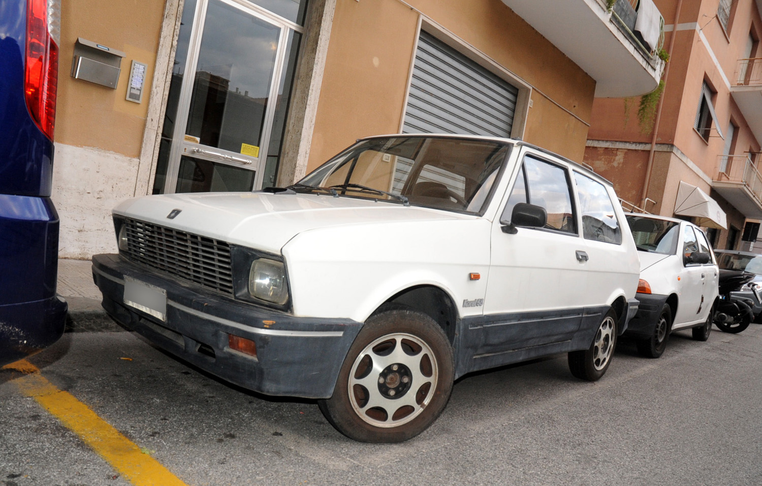 Une Innocenti Koral à Chiavari, en 2008 (photo mise à ma disposition par Roulax).